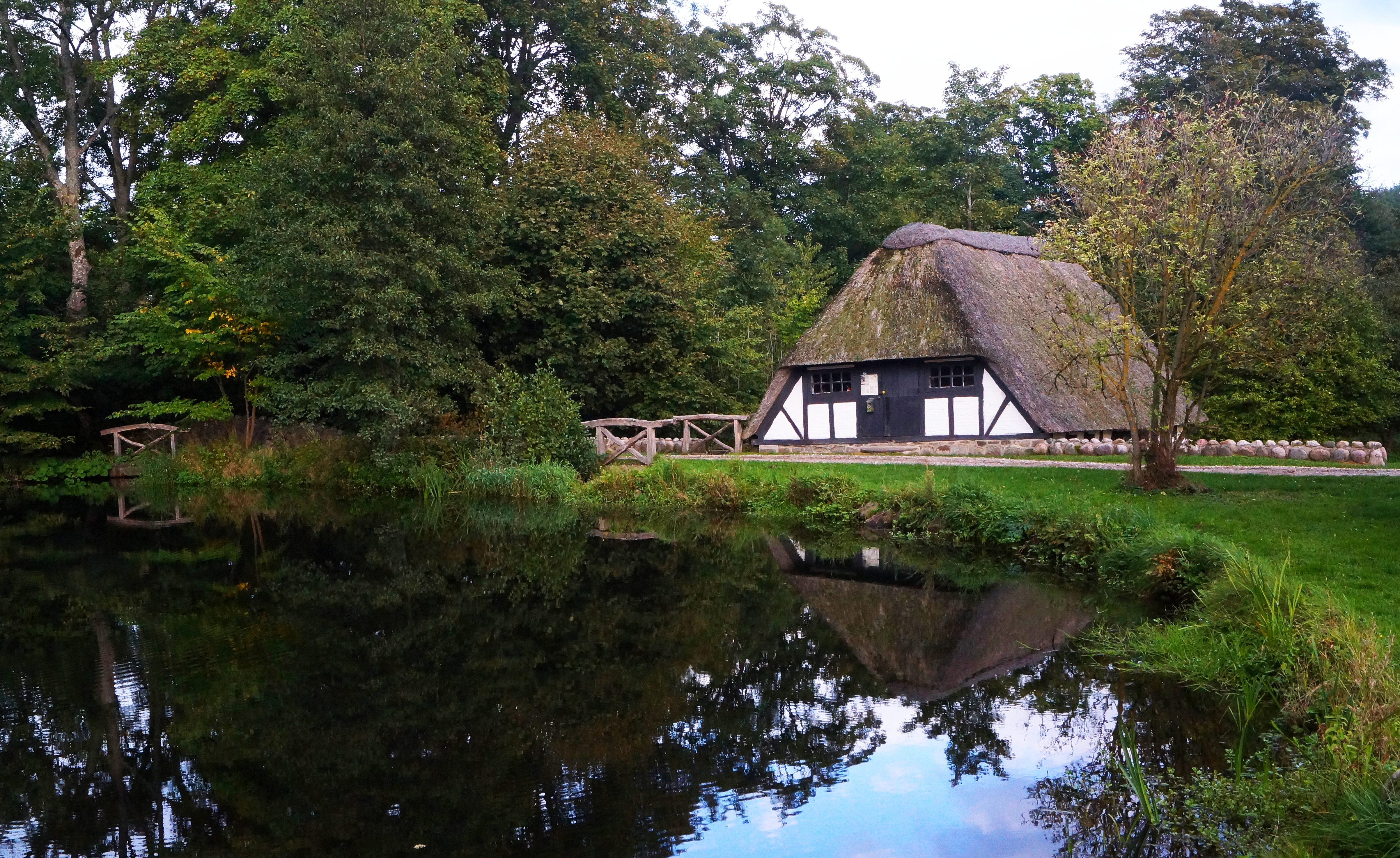 Ørnbjerg Mølle